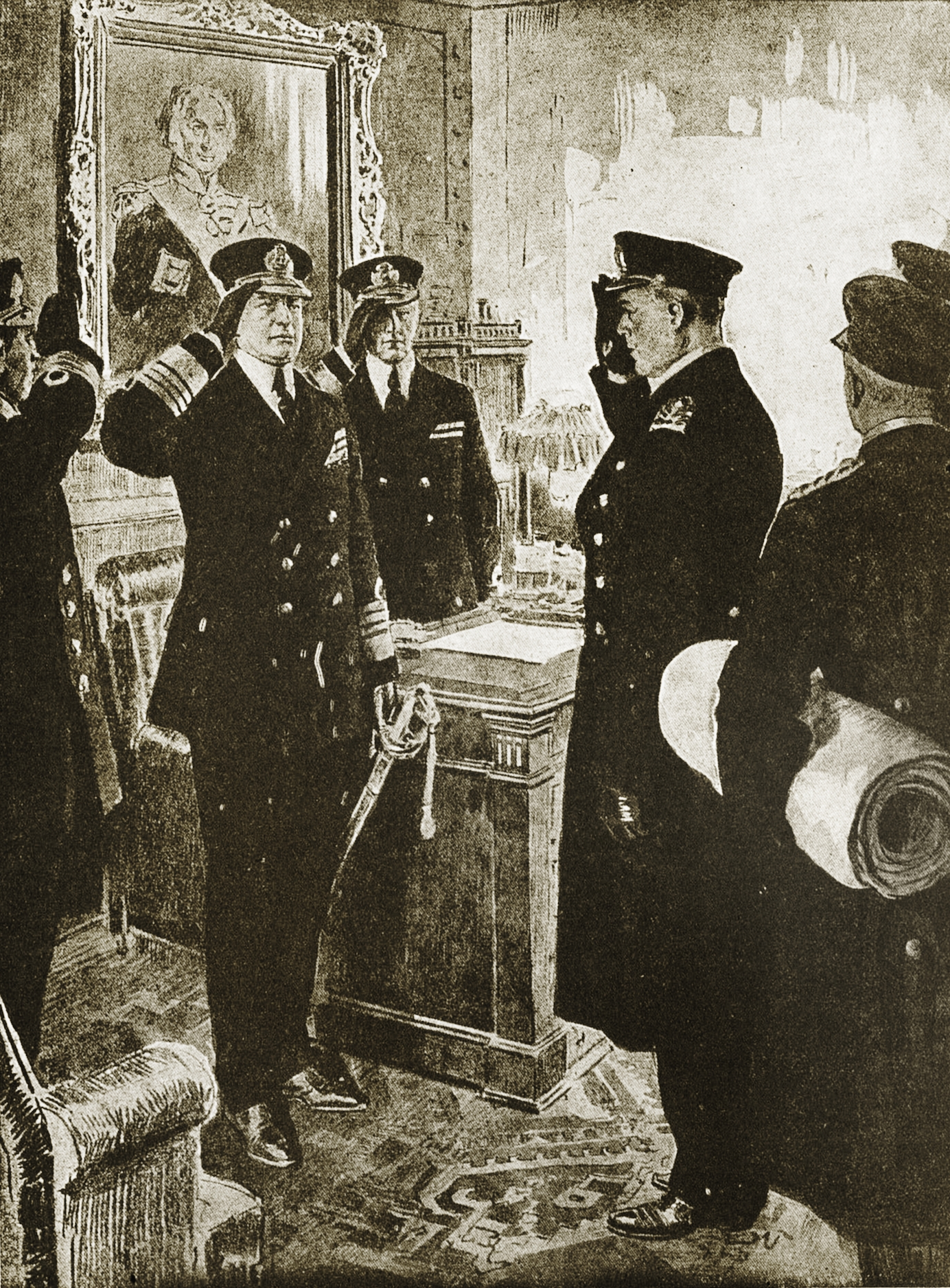 dans le salon_à_bord_du_Queen_Elizabeth, l'amiral Beatty reçoit_Meurer_qui négocie les conditions de redition de la flotte allemande en 1918.